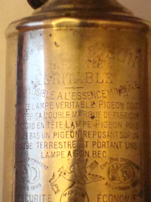 Lampe Pigeon, marque de fabrique sur le devant de la lampe.